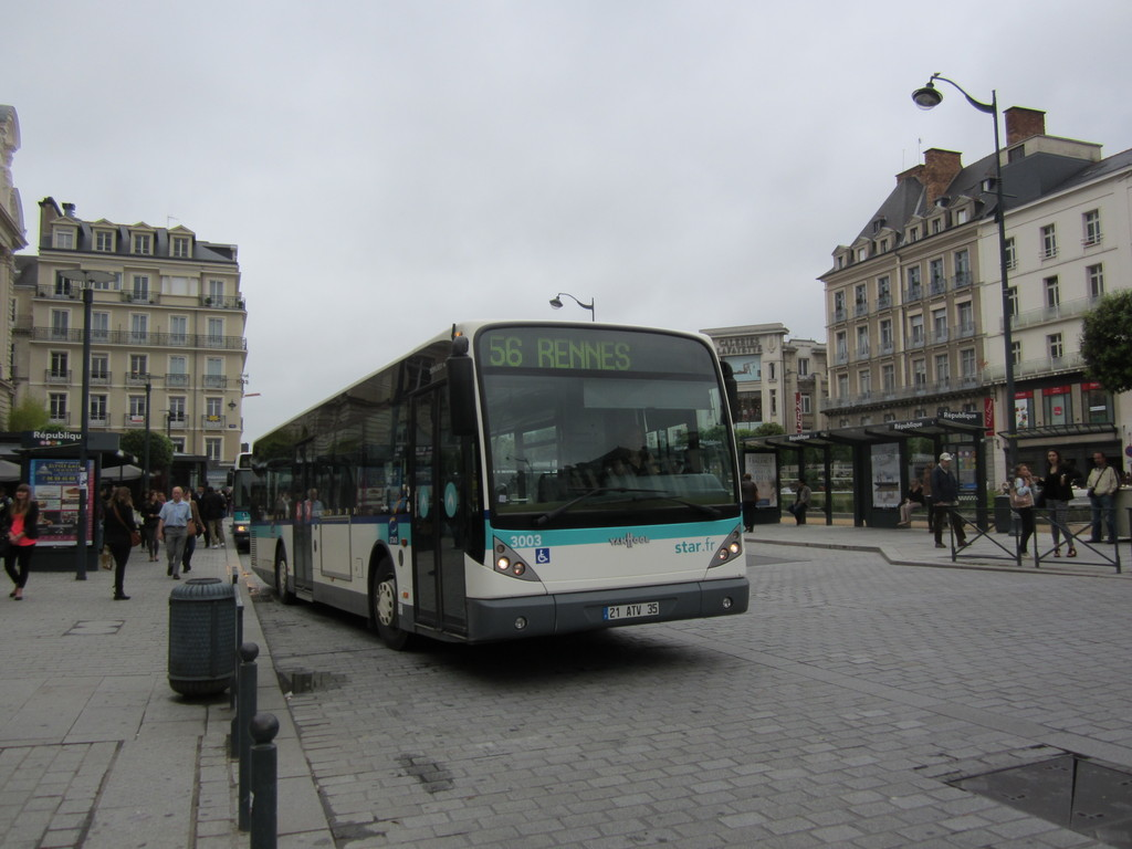 Van Hool NewA330 n°3003 du réseau STAR de Rennes, à l'arrêt République.